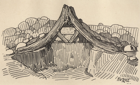 Fürstengrab von Helmsdorf